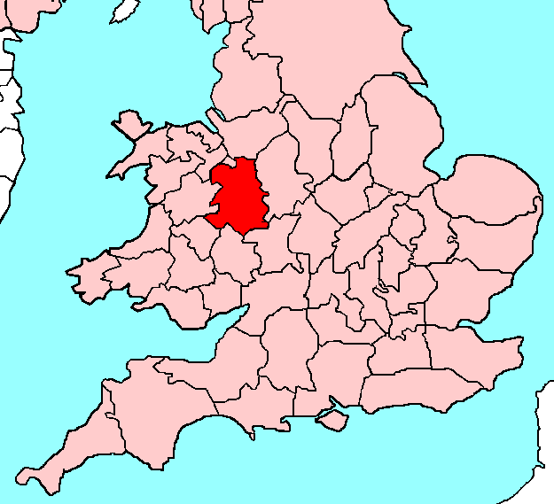 Shropshire